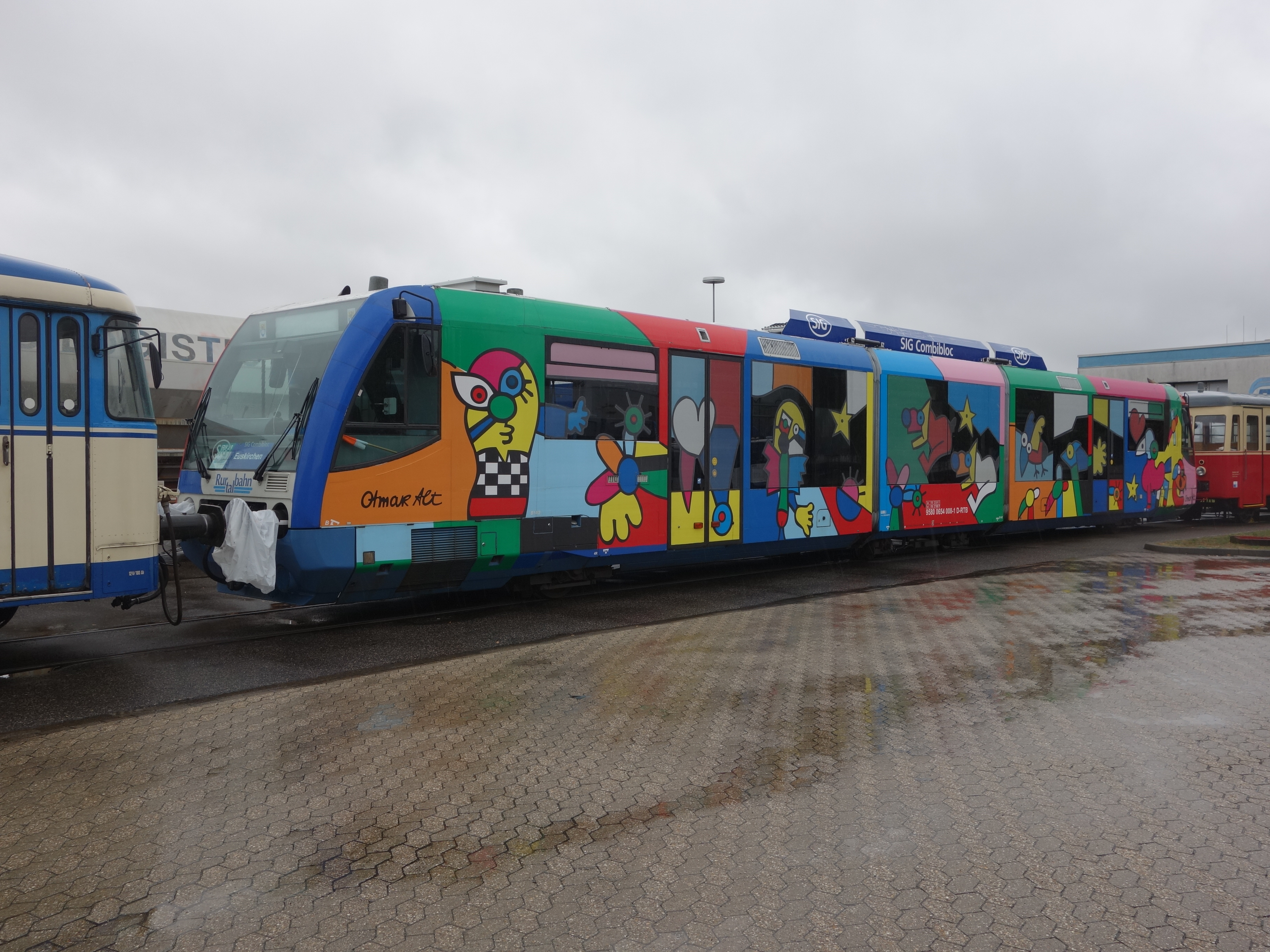 Dieser RegioSprinter mit der Betriebsnummer 6.008.1 wurde 2002 vom Künstler Otmar Alt gestaltet und auf zahlreichen Sonderfahrten eingesetzt, aber auch auf den Wochenend-Fahrten der Bördebahn, bevor diese für den täglichen Verkehr reaktiviert wurde.